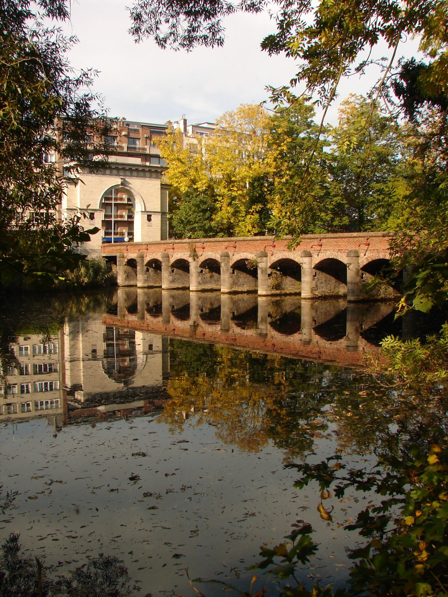 De Brusselsepoort en voorliggende brug te Dendermonde